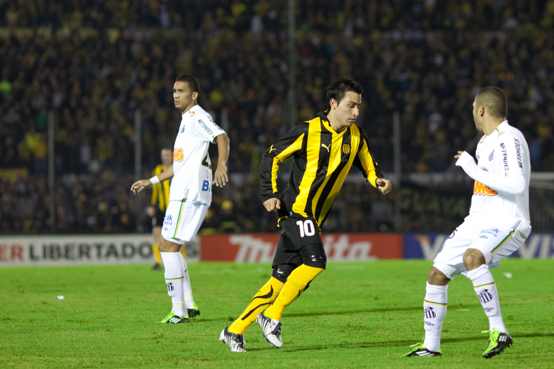 Danilo Santos during the 2011 Copa Libertadores Final